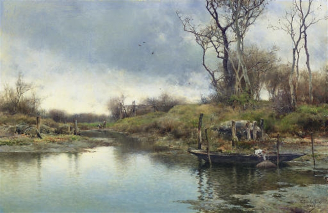 Il ampo de Marte Il ampo de Mart